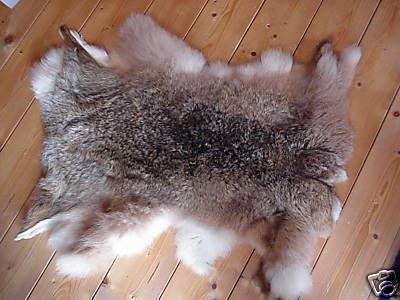 Hare skin from Germany - Deutsches Feldhasenfell